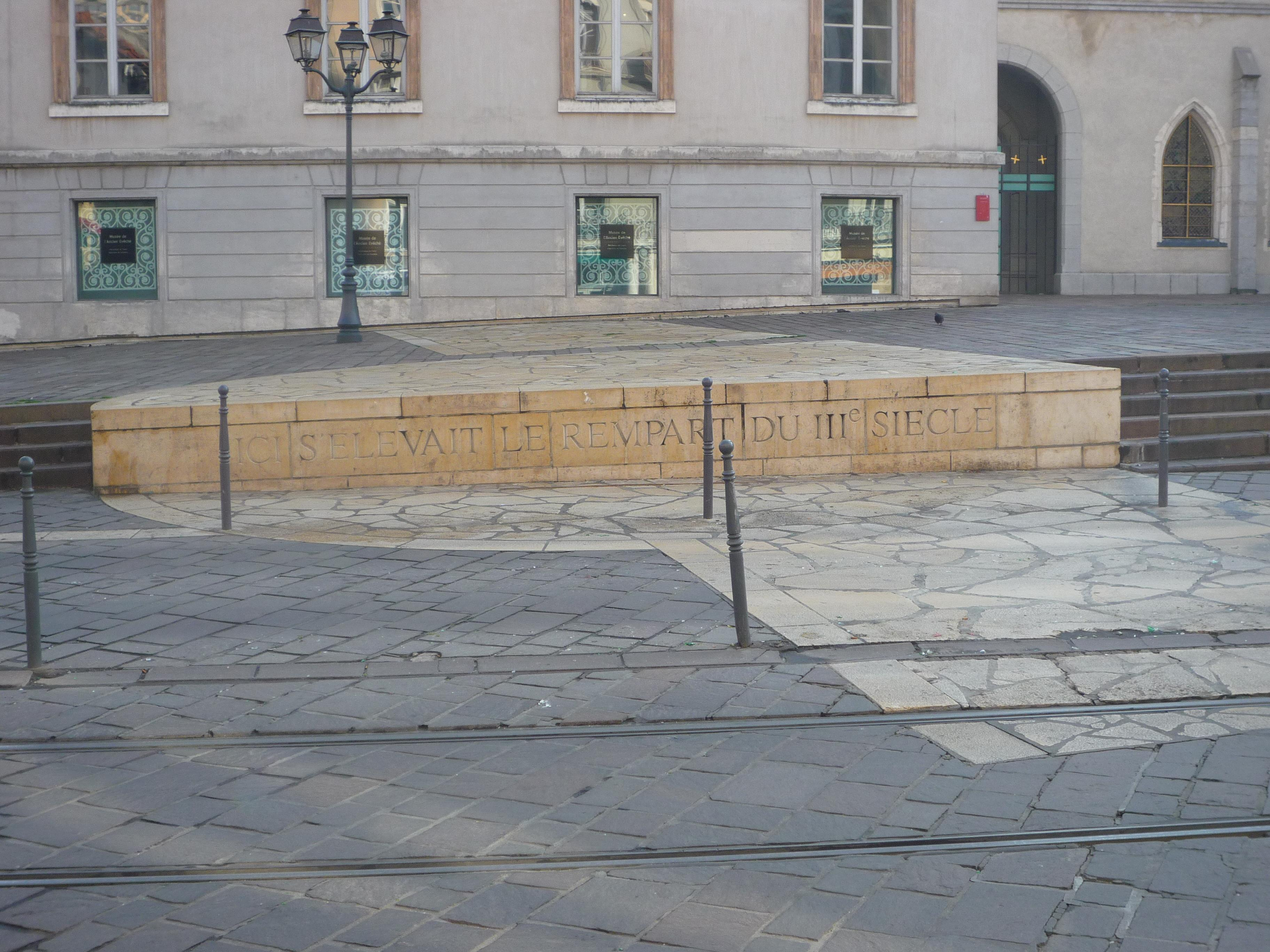 Situation extérieure de la crypte archéologique (baptistère du IVe siècle et rempart du IIIe siècle) du musée de l'ancien évêché - Grenoble.